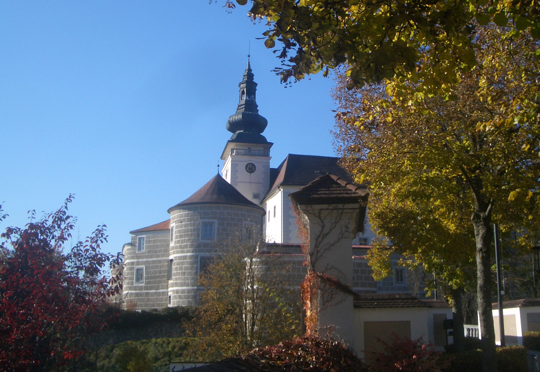 Schloss Weinberg in Kefermarkt, Oberösterreich Object location48° 26′ 55″ N, 14° 32′ 15″ E